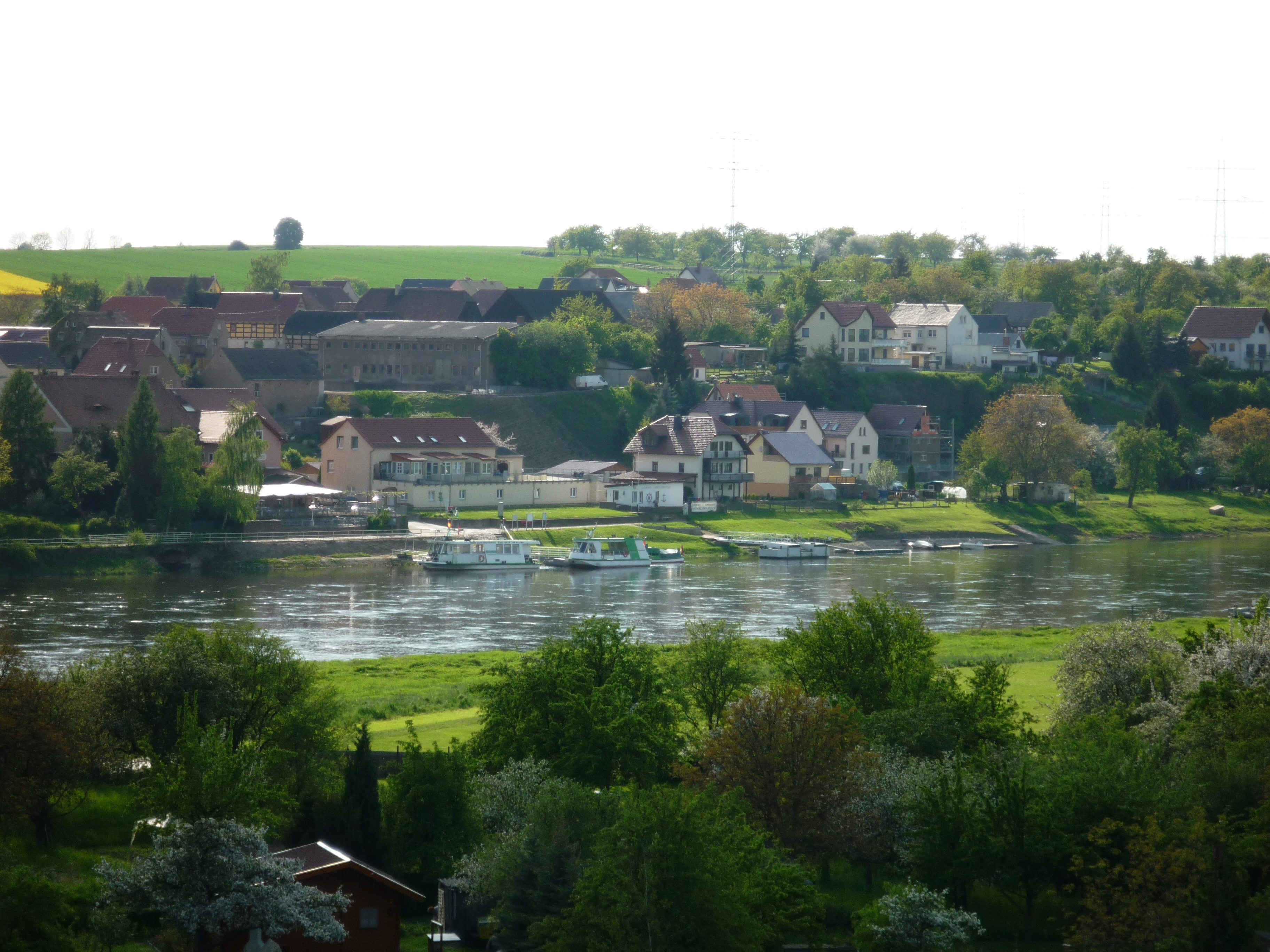 Blick auf einen Teil von Niederlommatzsch, lnkselbischer Ortsteil von Diera-Zehren.